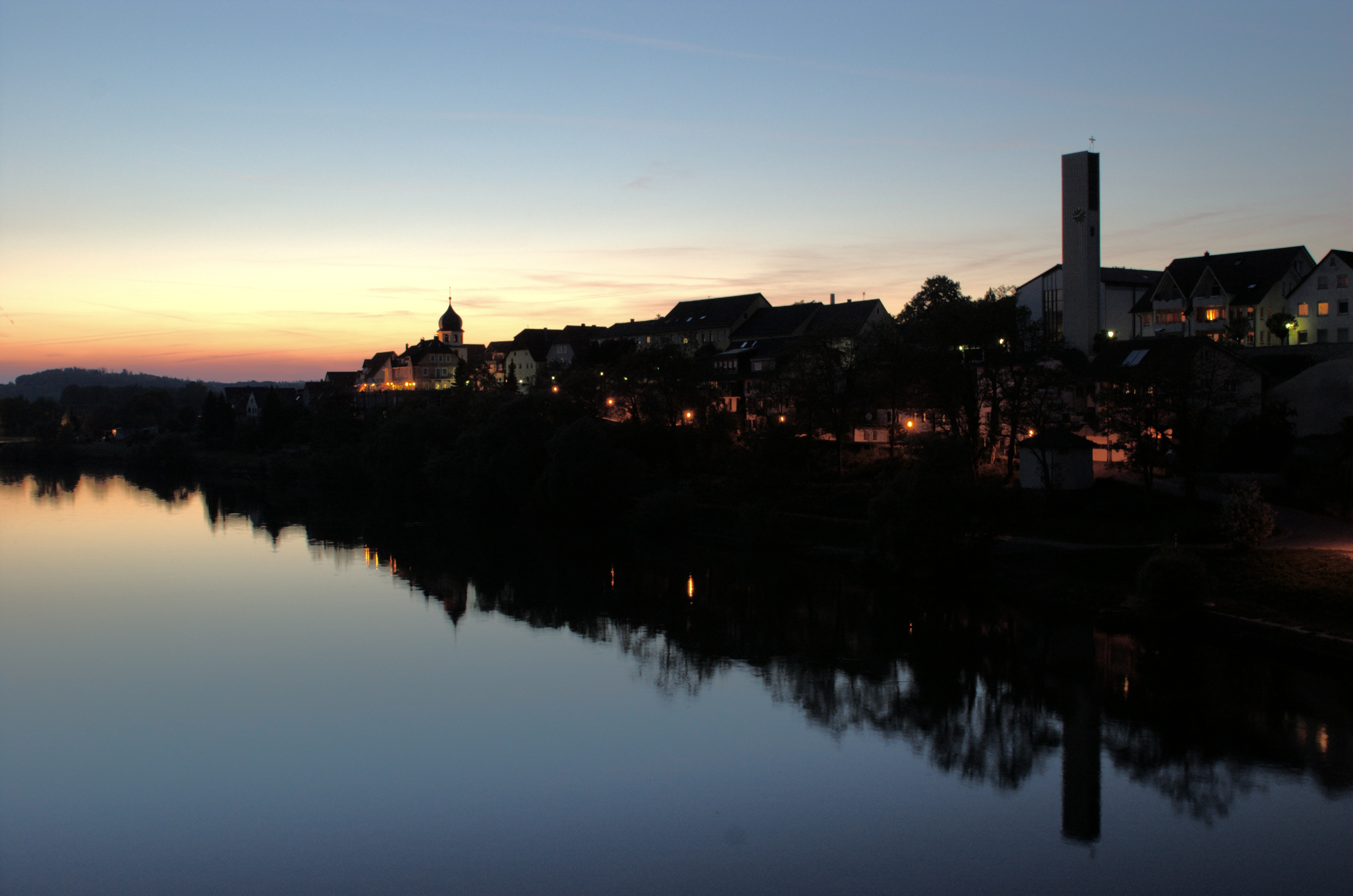 Jagstfeld am Abend